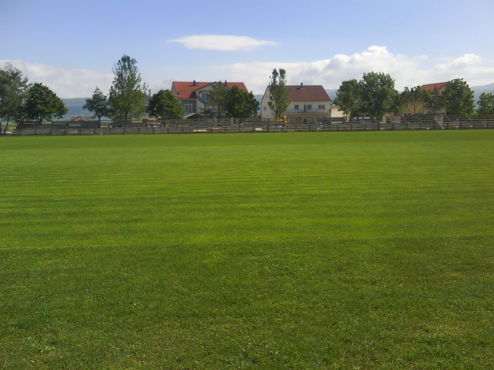 Gradski stadion Tomislavgrad